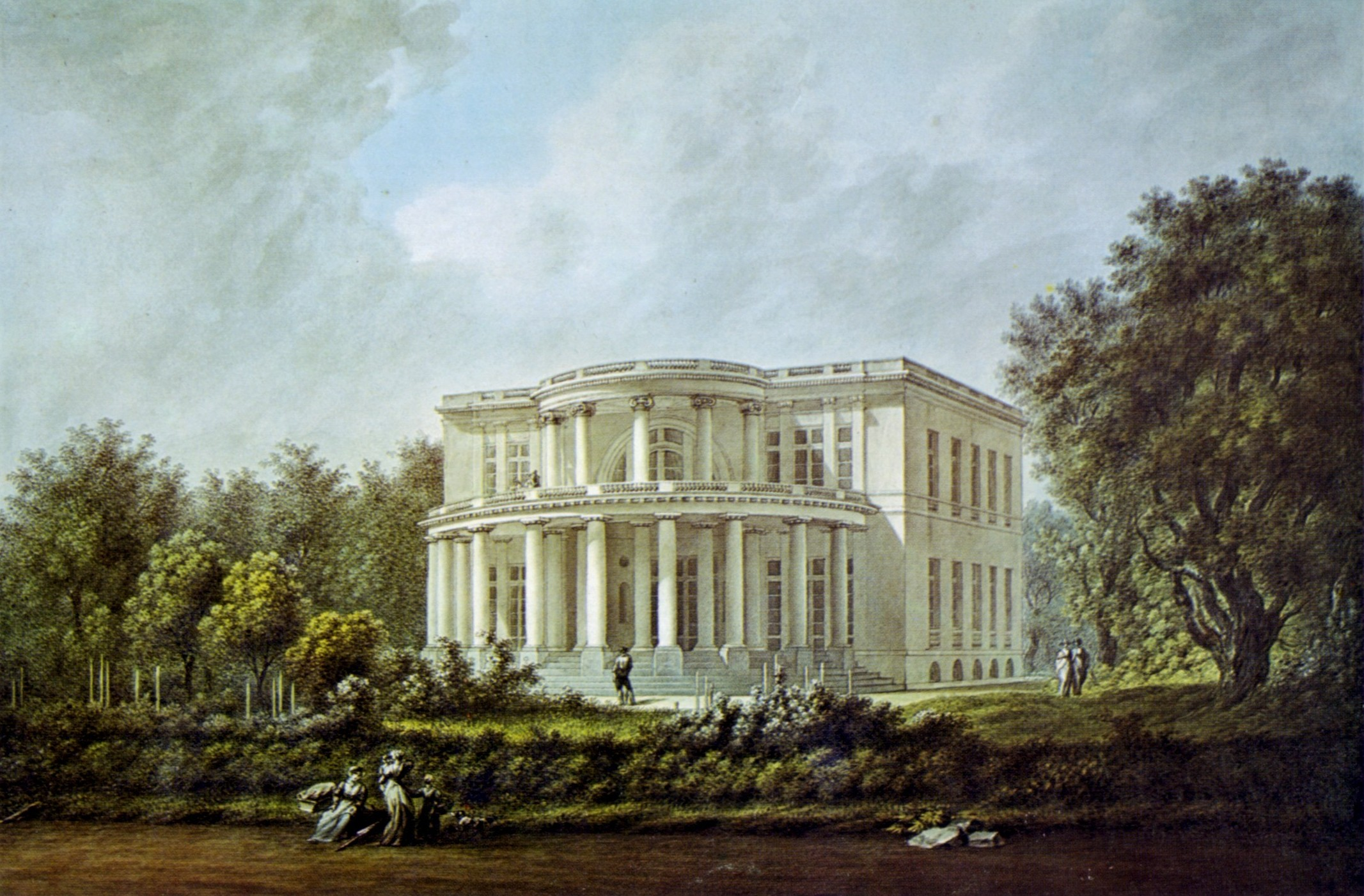 Landhaus Brandt ("Säulenhaus") in Othmarschen, Elbchaussee 186, erbaut 1817, Aquarell von Carl Friedrich Stange um 1825